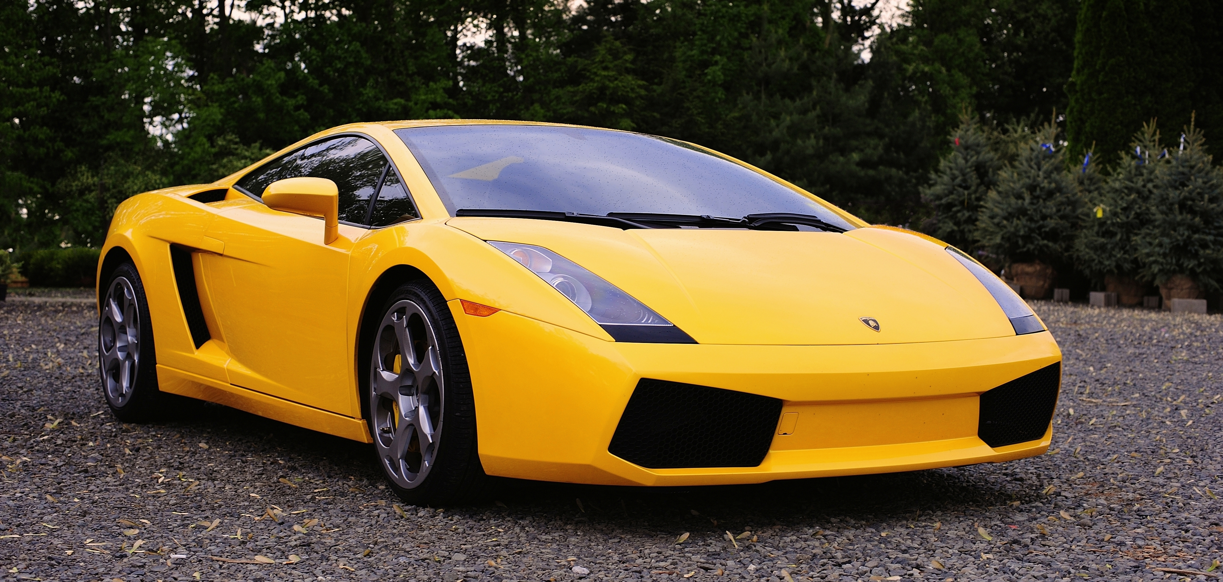 Basking Ridge, NJ